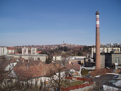 Komlo